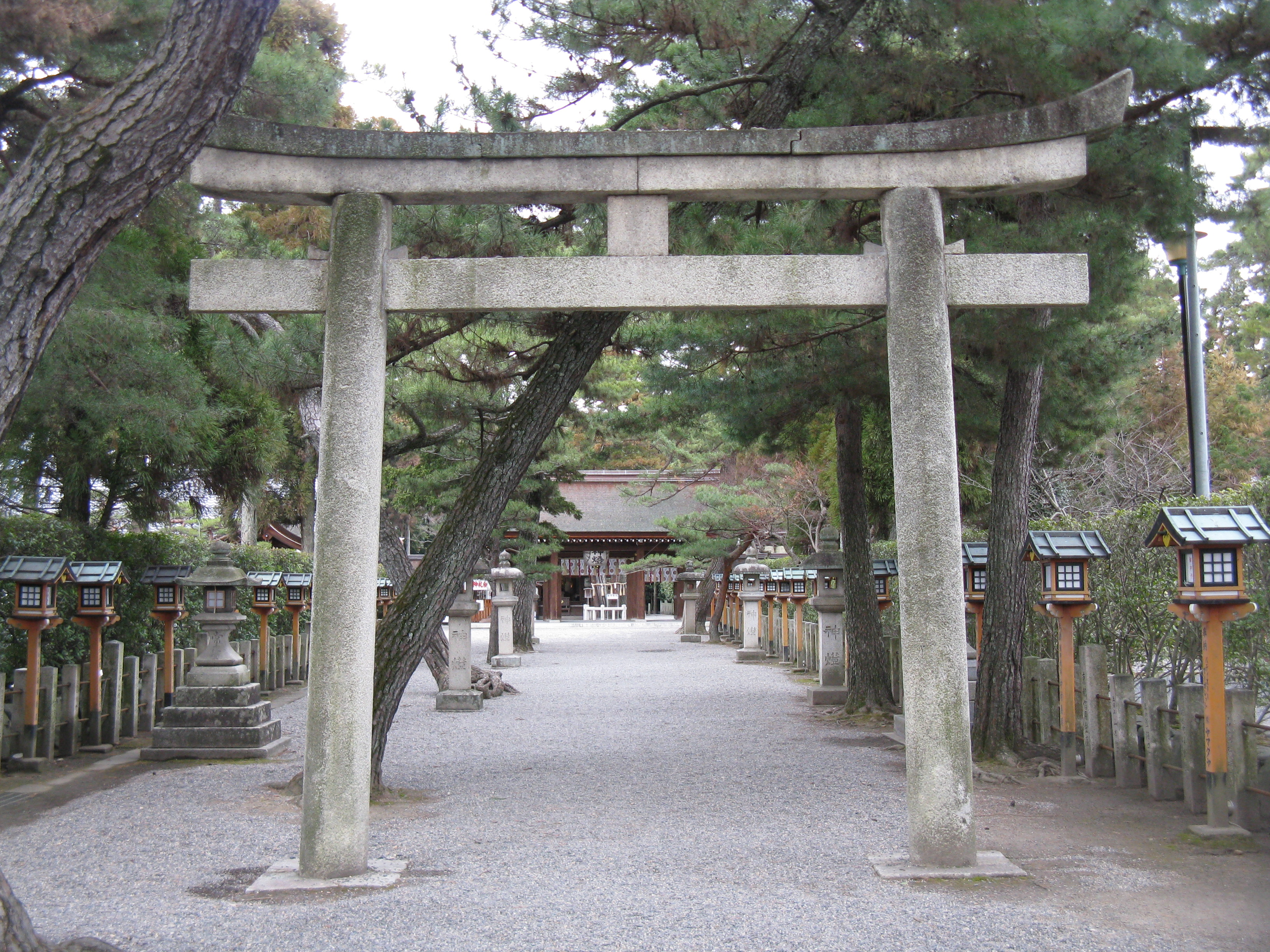 建部大社 参道